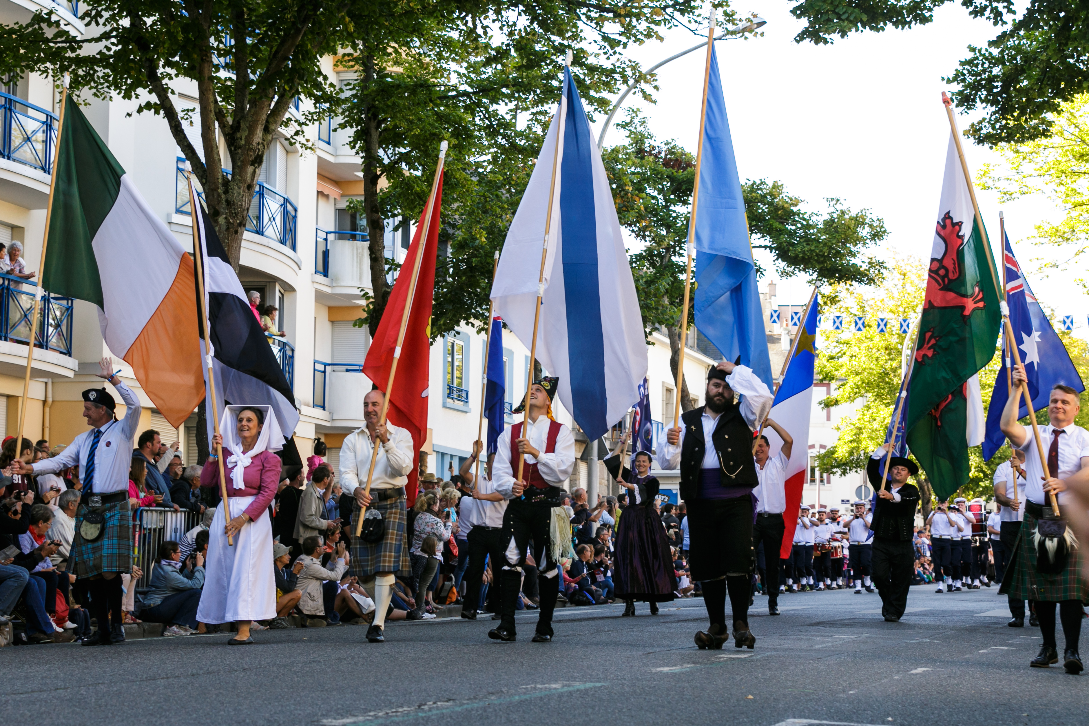 Festival Interceltique de Lorient 2017 - Grande parade des nations celtes - Drapeaux des Nations celtes